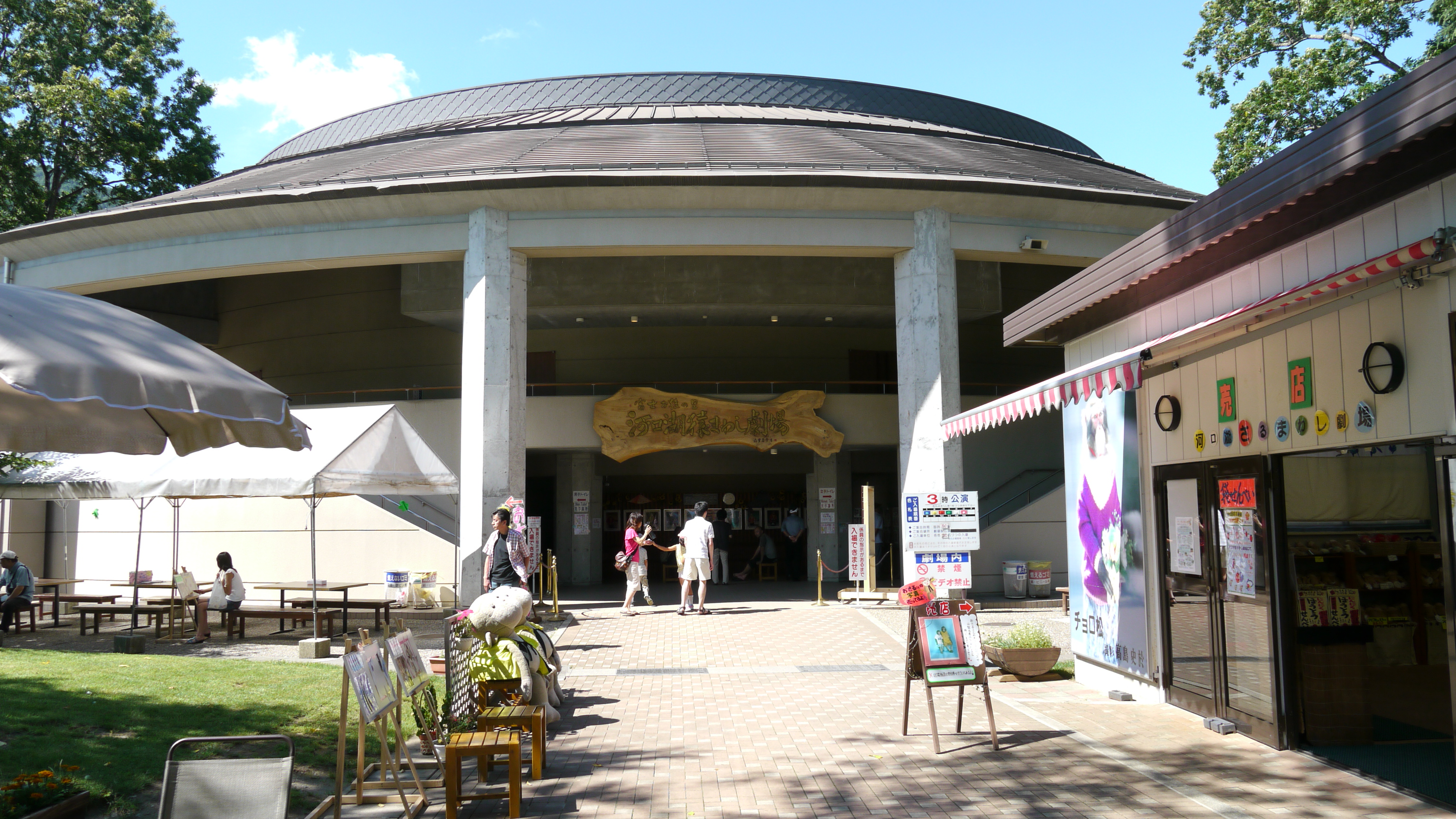 山梨県富士河口湖町の河口湖猿まわし劇場。